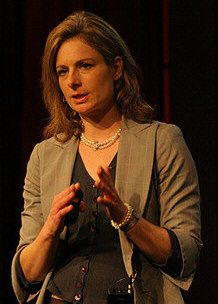 Lisa Randall